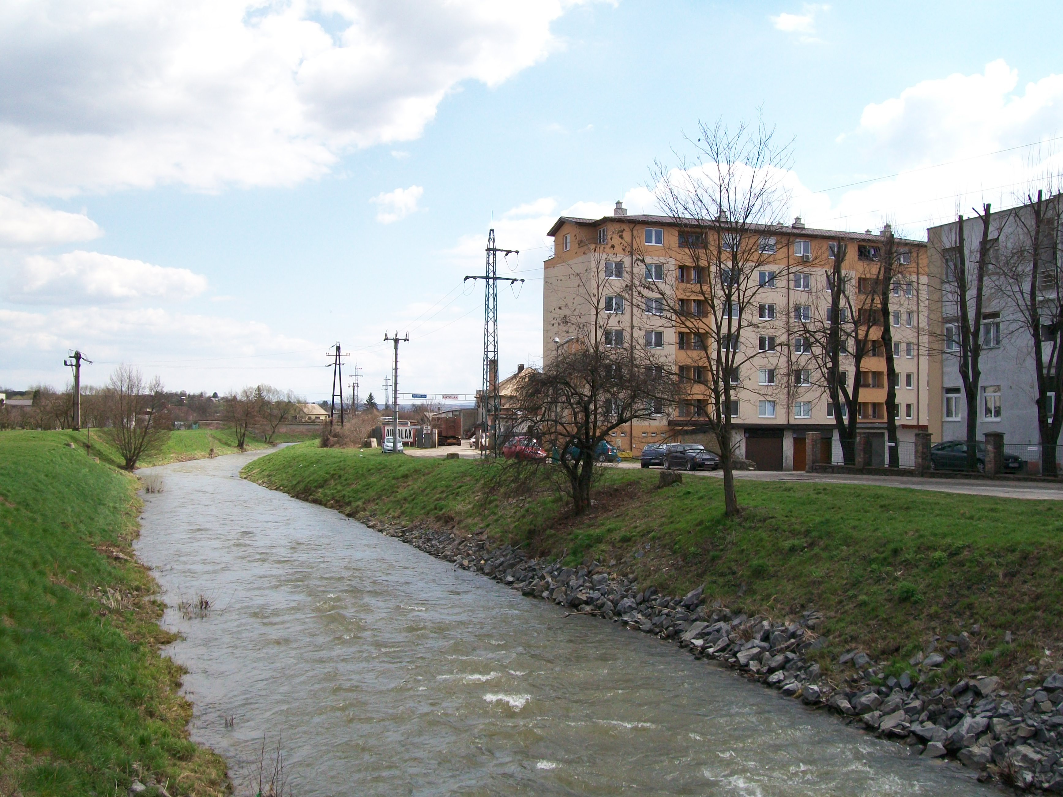 Krivánsky potok pretekajúci Opatovou